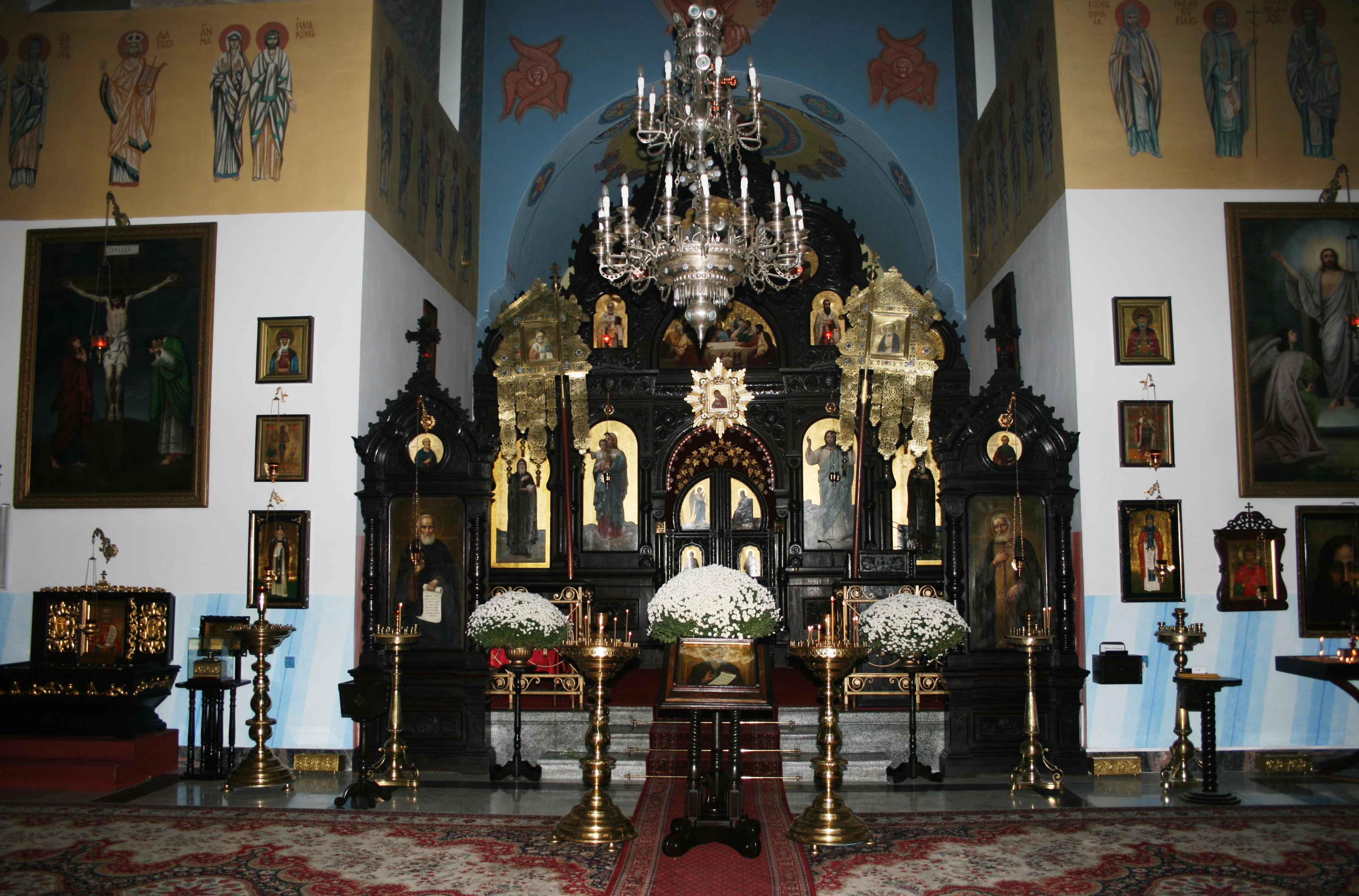 L Warszawa - Orthodox church of St. John Climacus - Iconostasis